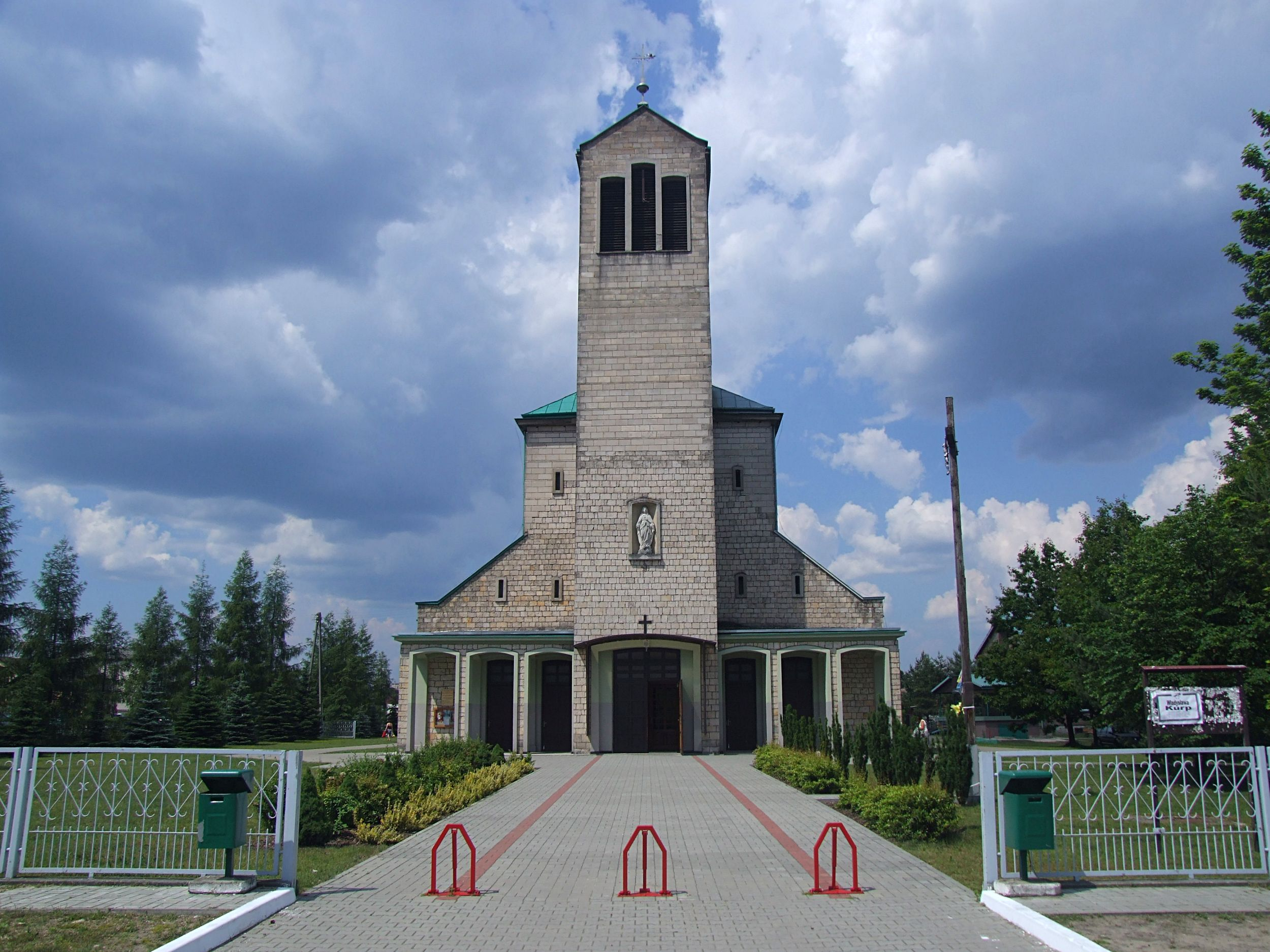 Stąporków - Kościół parafialny